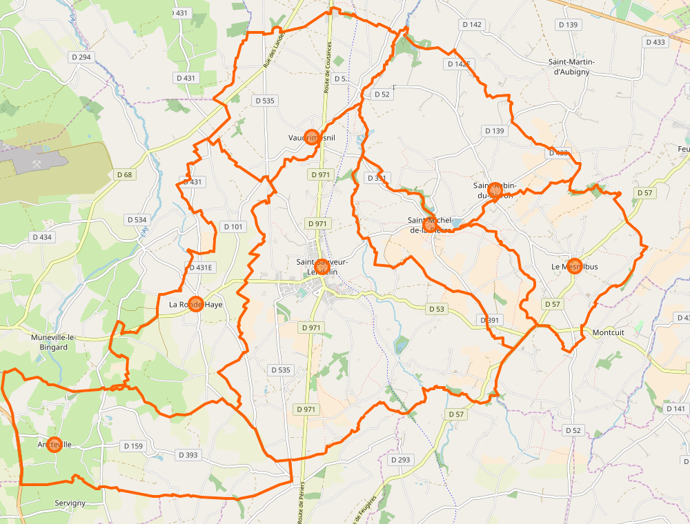 Carte de la commune nouvelle de Saint-Sauveur-Villages